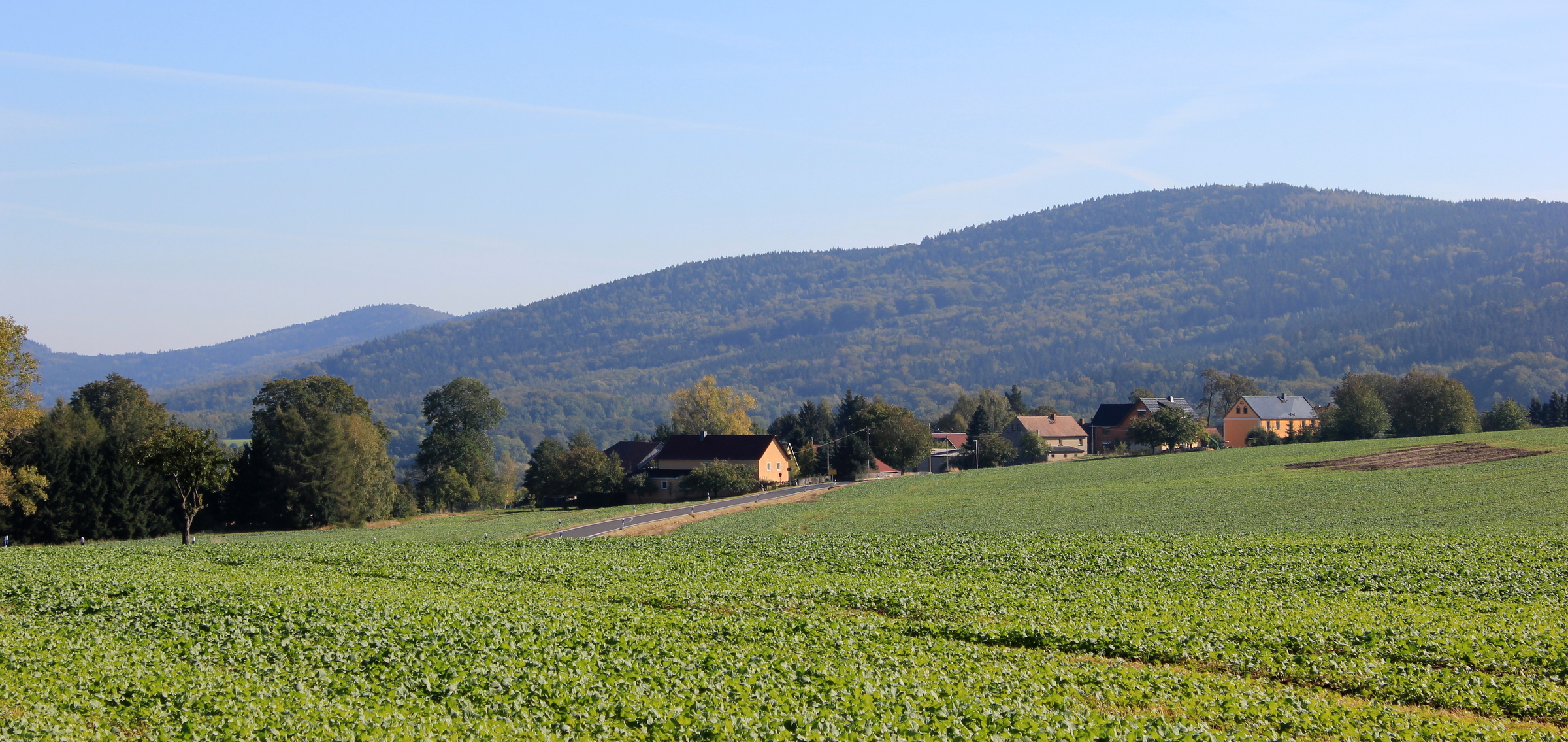 Pielitz und der Czorneboh in der Gemeinde Kubschütz. Hornjoserbsce: Wjeska Splósk a Čornobóh w Kubšičanskej gmejnje.